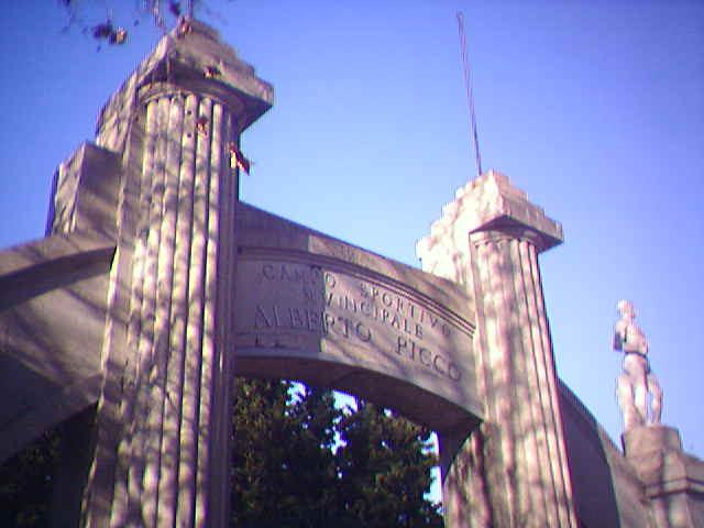 Ingresso Monumentale dello stadio "Alberto Picco", La Spezia, Italia.